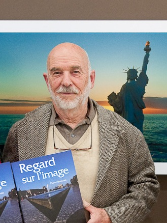 recadrage fait à partir de